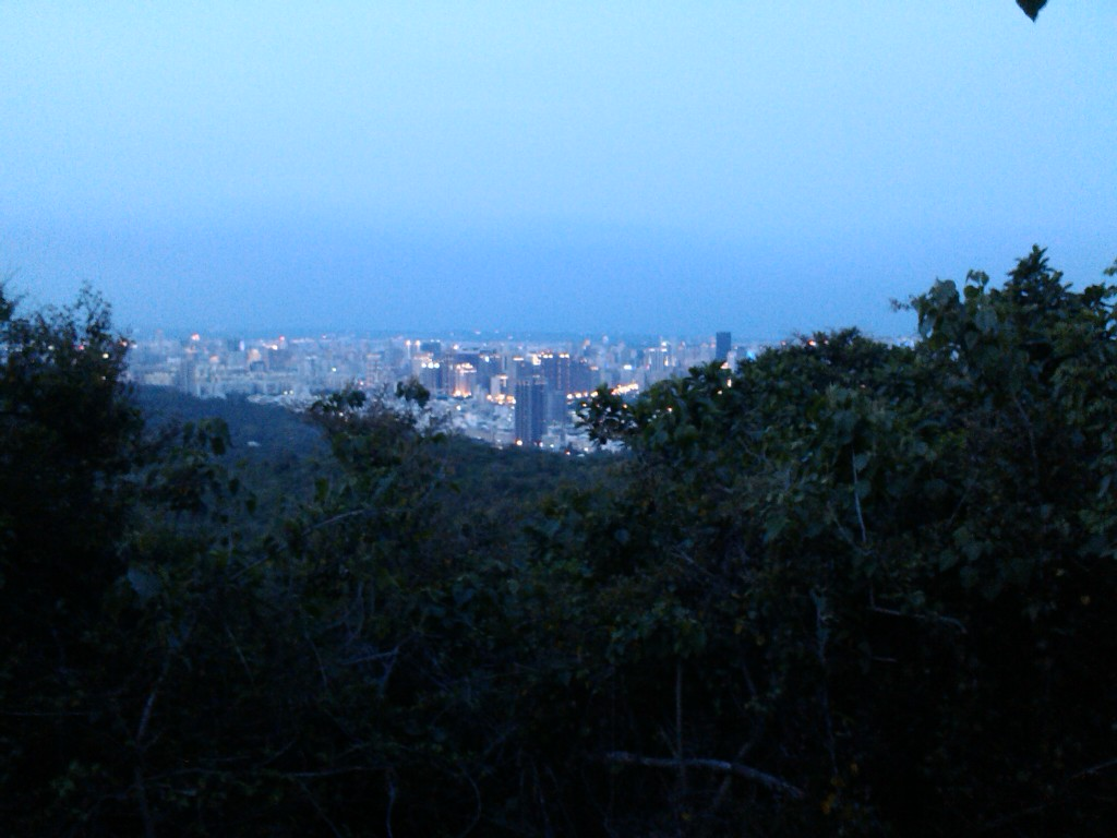 傍晚六點的雅座亭周遭之登山步道